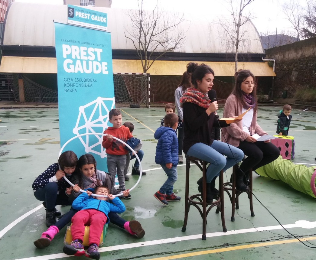 Haur motxiladunak, 2018ko urtarrilaren 13ko manifestaziora joateko dei egiten